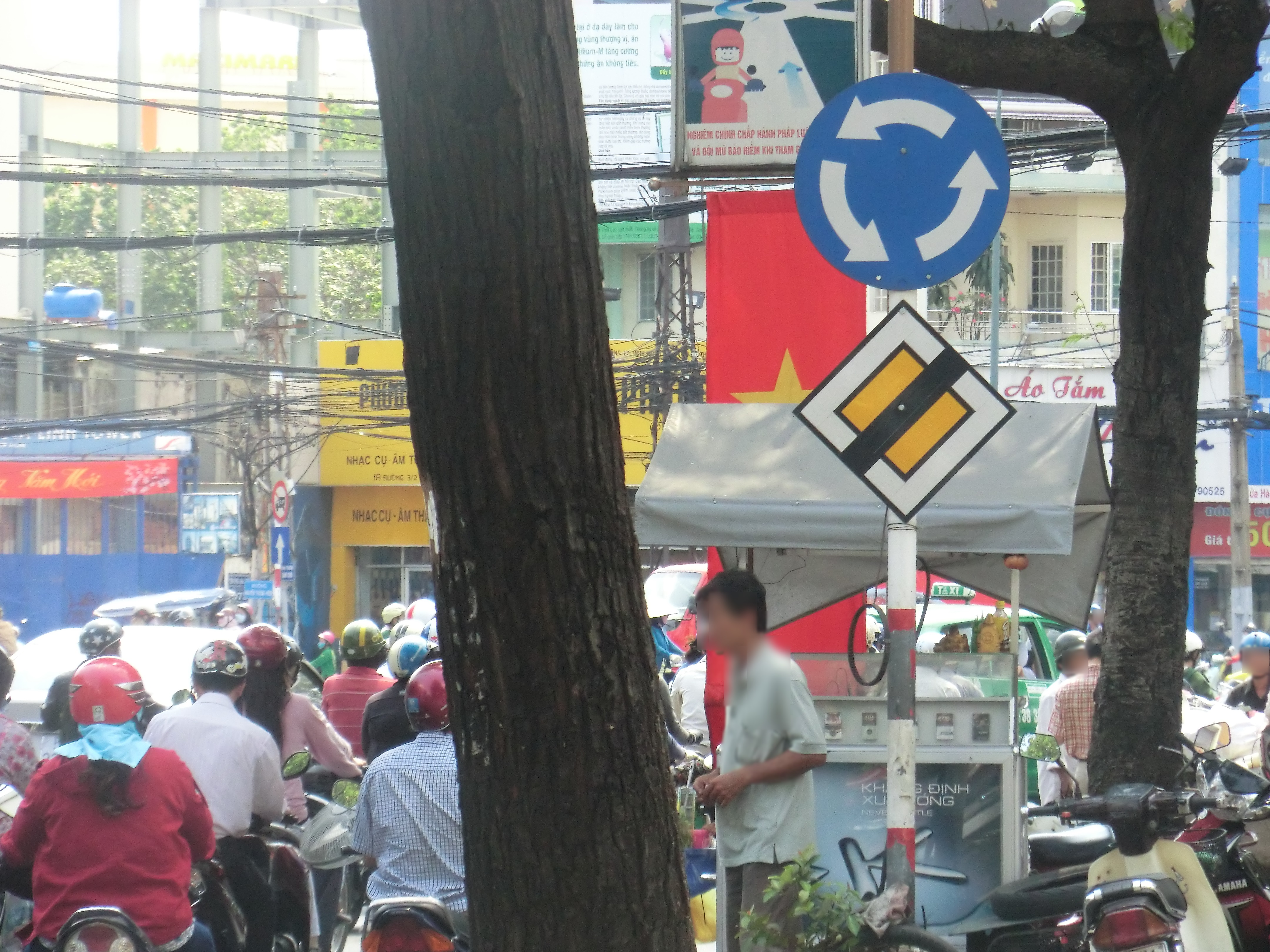 ベトナム国ホーチミン市に複数あるラウンドアバウトのうちの１つの入り口